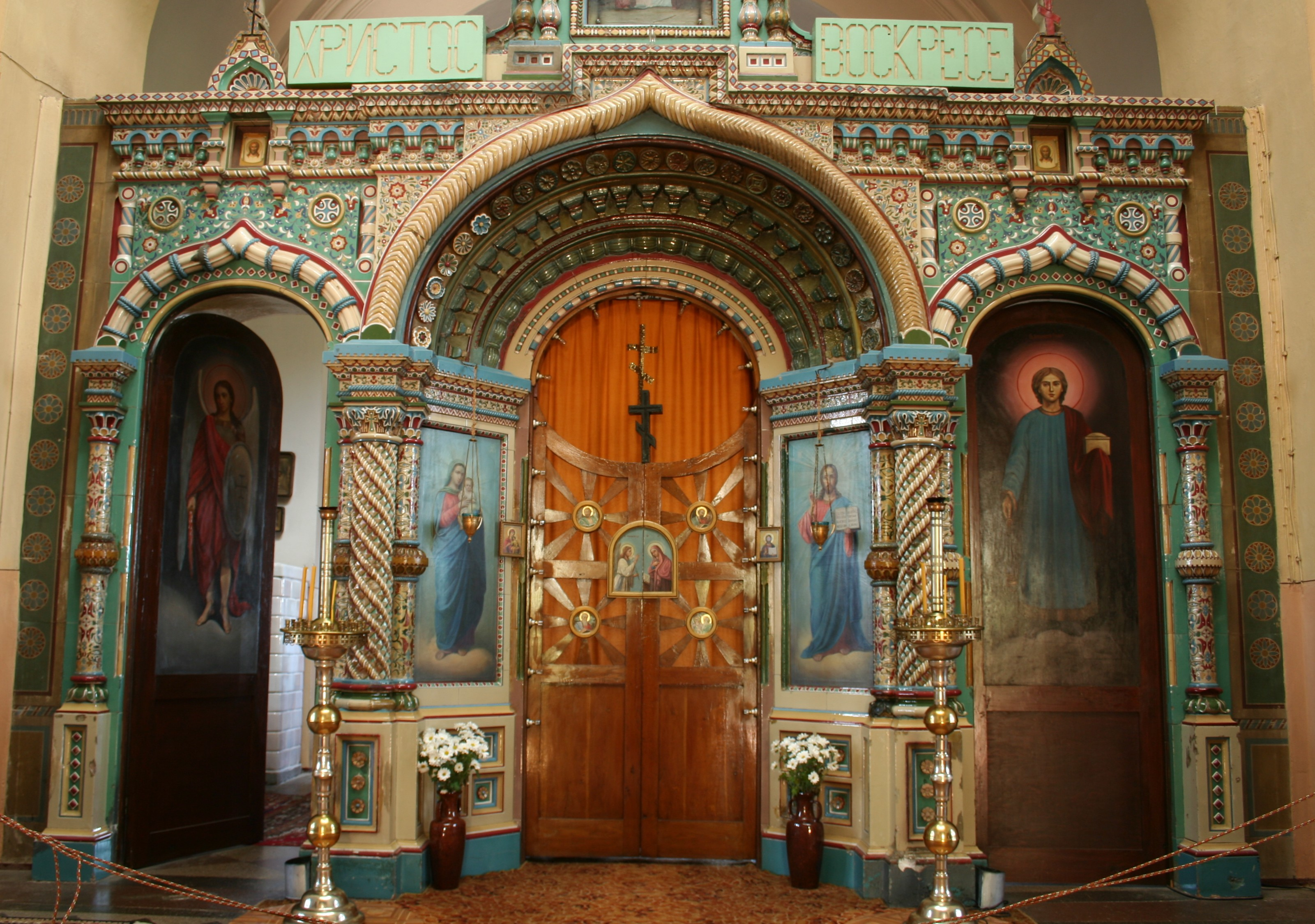 porcelanowy ikonostas w cerkwi Mikołaja Cudotwórcy w Białowieży